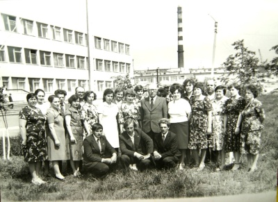 Перший педколектив школи